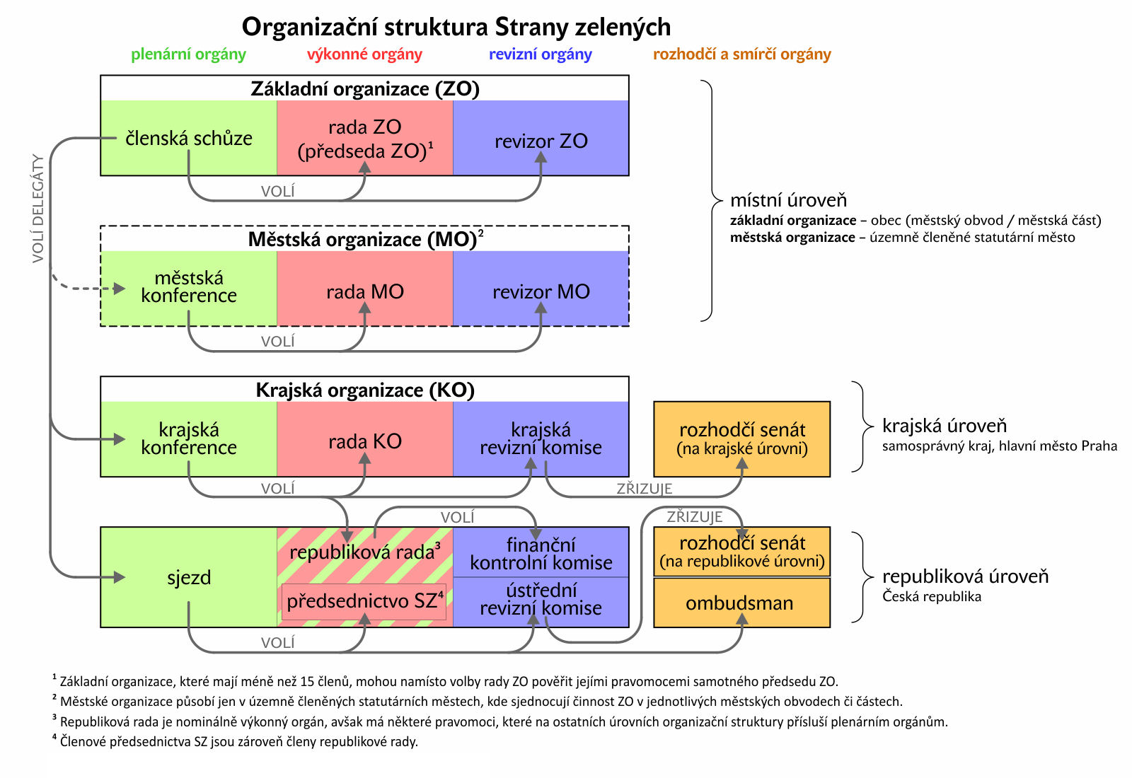 Organizační struktura Strany zelených dle Stanov SZ schválených v prosinci 2011